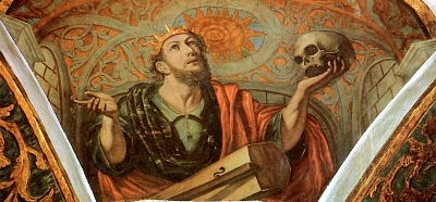 David, por Juan Galván. Fresco de las pechinas del Monasterio de la Concepción de Épila.